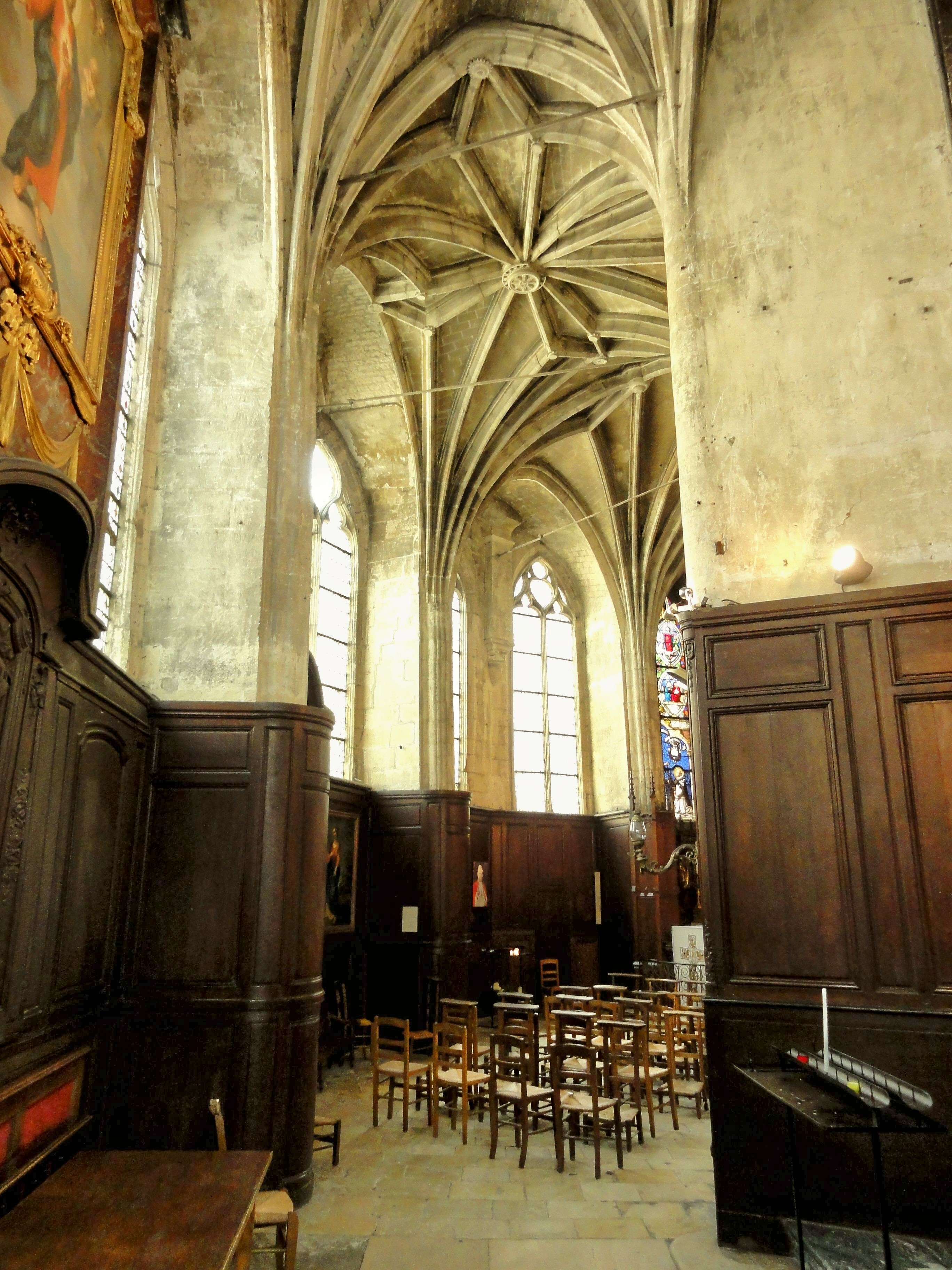 Déambulatoire, 4e travée (nord-est), vue vers le sud.